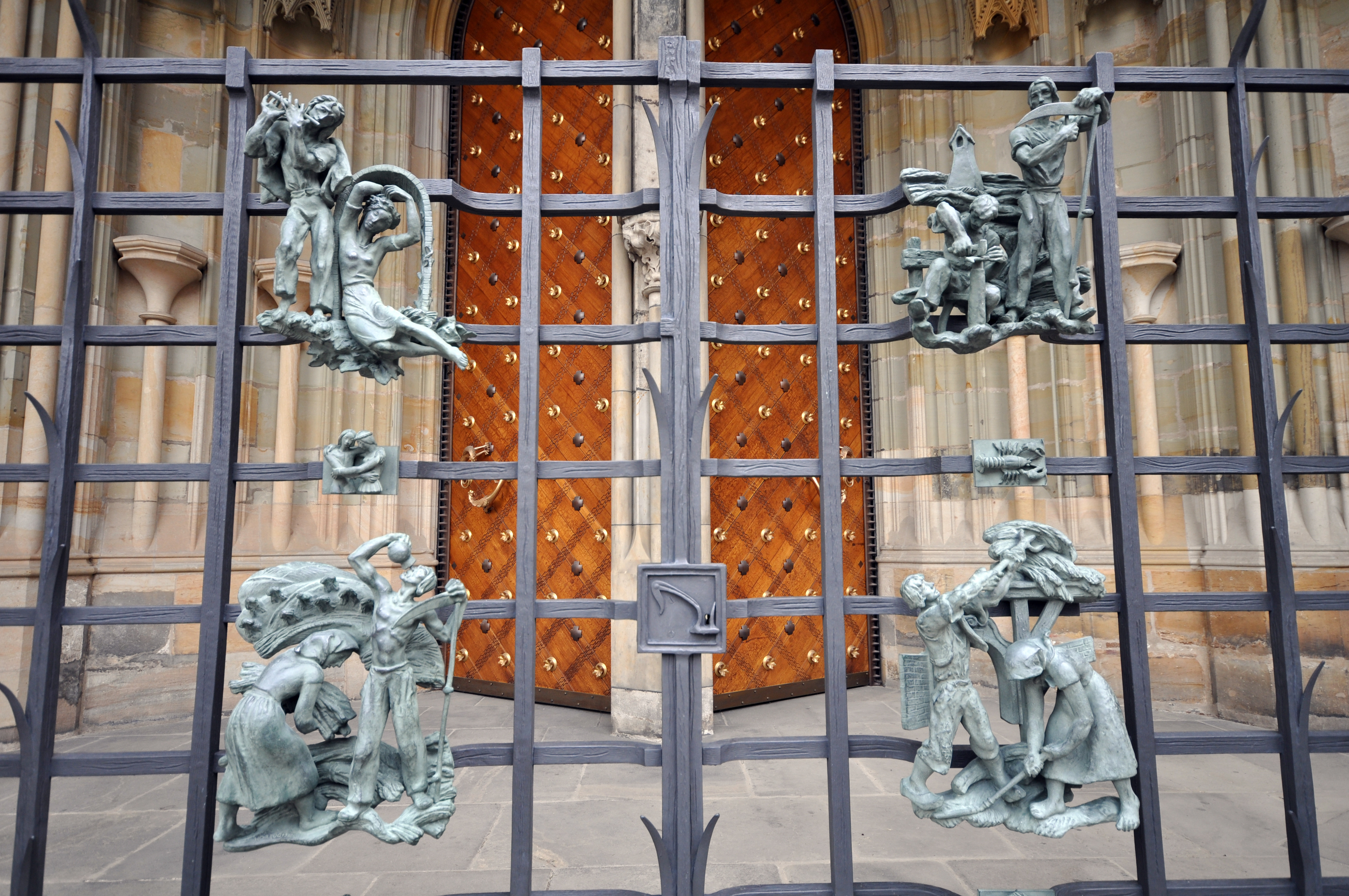 Prag